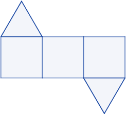 Las dos bases son triángulos y las caras laterales son rectángulos. Si el prisma es uniforme, las bases son triángulos equiláteros y las caras laterales son cuadrados.